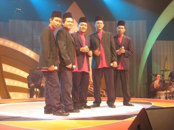 Voice of Men Akademi Nasyid